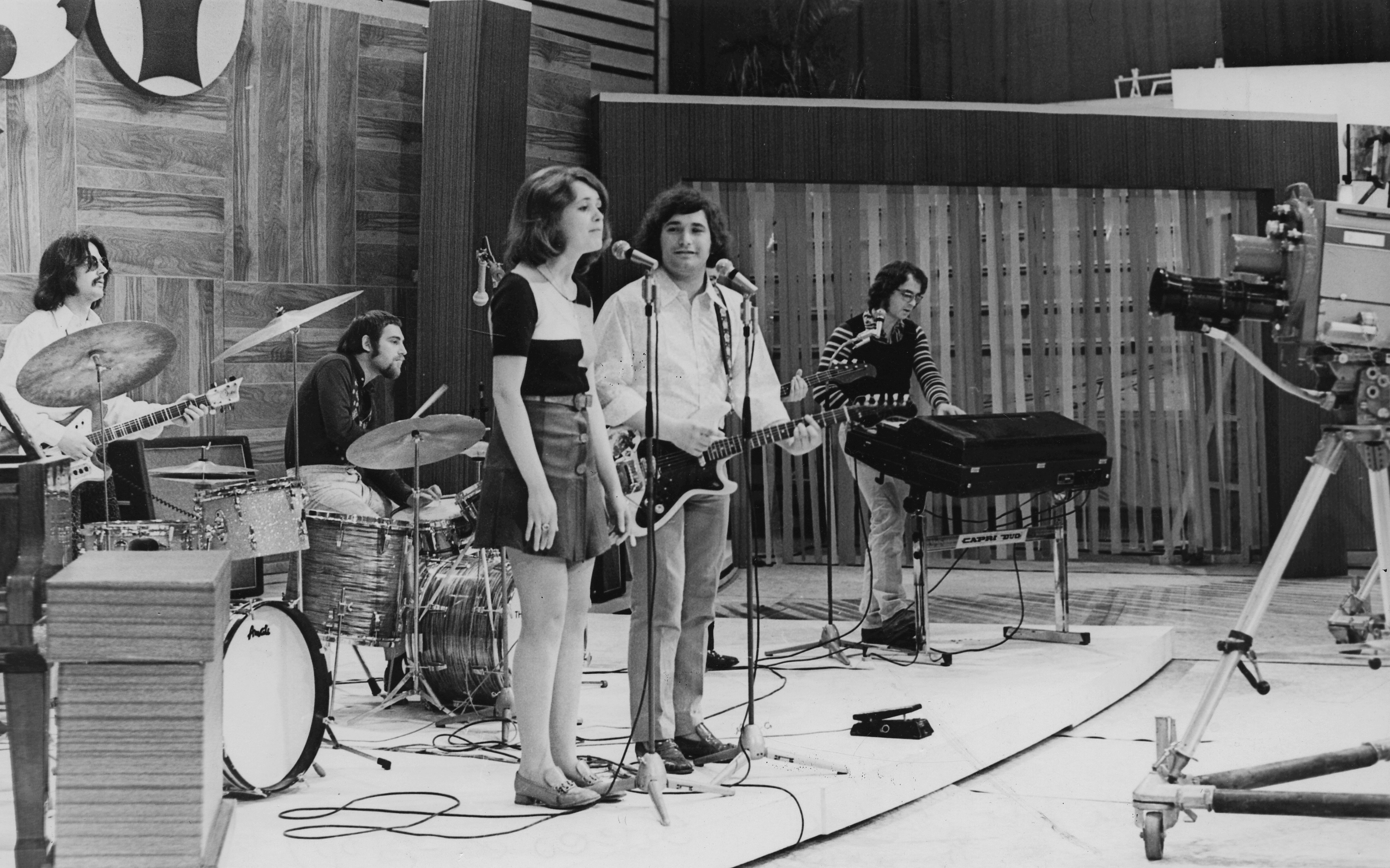 Ki mit tud? Sztereo együttes. Location: Hungary Tags: Hungarian TV Title: Ki mit tud? Sztereo együttes.